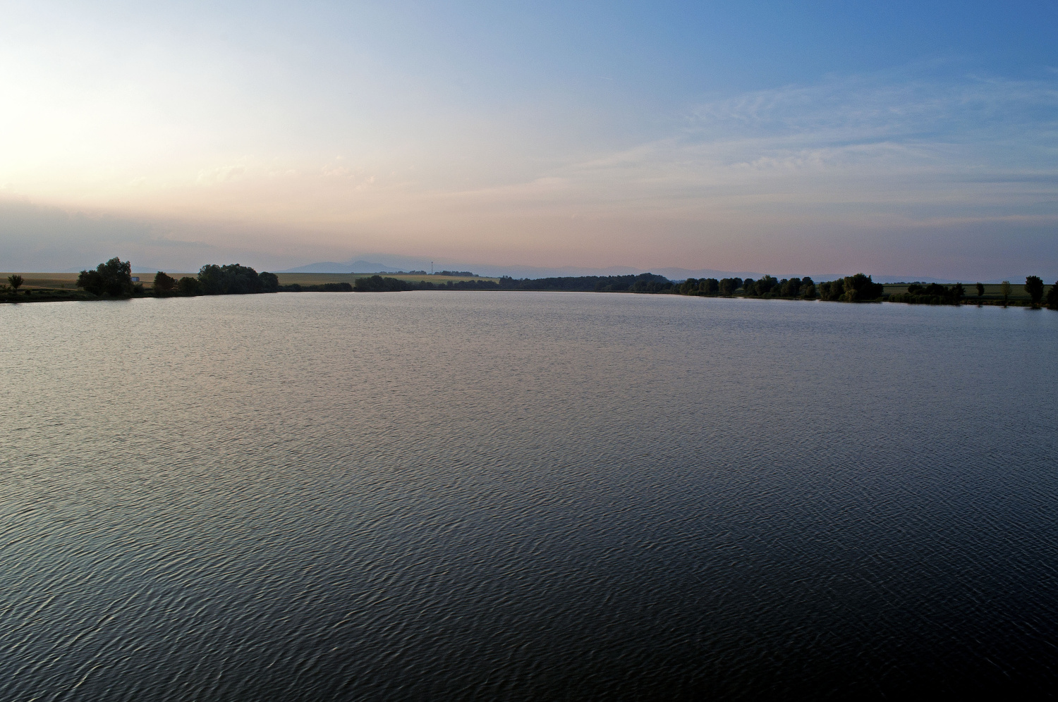 Priehrada, Slepčany